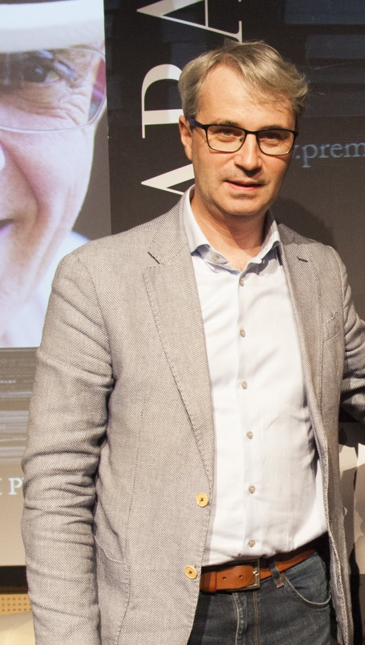 Il sindaco di Varese Davide Galimberti presenzia alla finale del Premio Chiara 2019